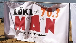 Középtávú és rövidtávú amatőr kupa, amelyet miden évben júniusban rendeznek meg Tiszalök több helyszínén.